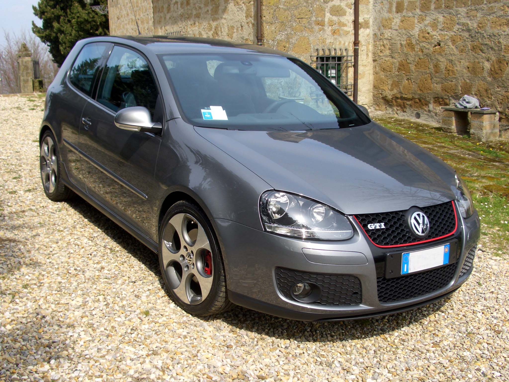 Orvieto - Golf GTI V serie Motore 2.0 litri benzina turbocompressore Potenza 200 hp Velocità 235 km/h Cambio manuale a 6 marce Pneumatici 225/40/18